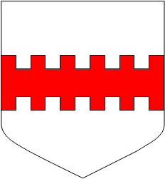 d'argent à une fasce bressetée de gueules